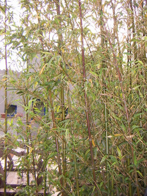 Semiarundinaria fastuosa Autor:Jordi Coll Costa 11:10, 14 May 2005 (UTC)